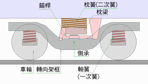 枕梁式轉向架說明圖